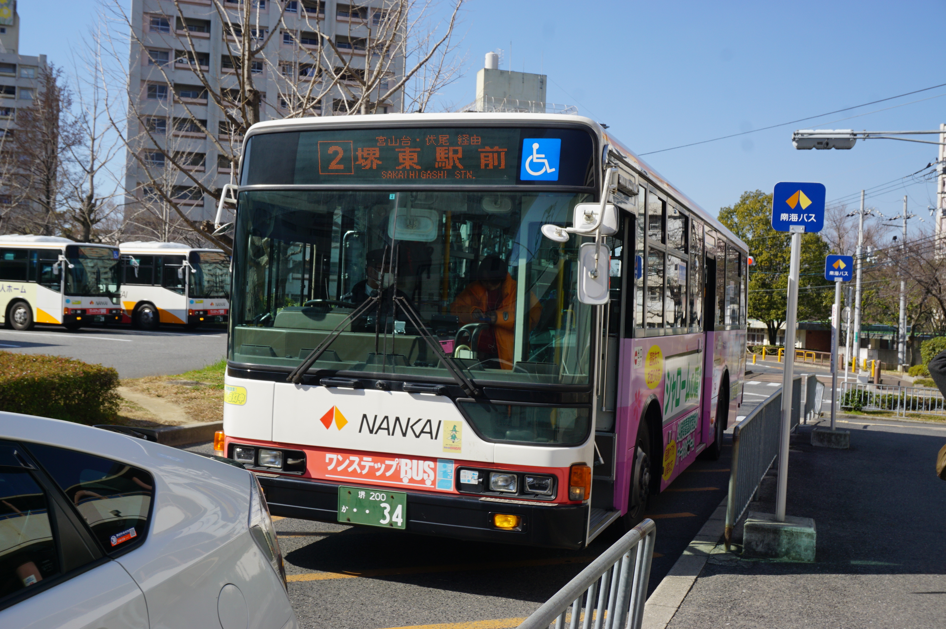 2系統（泉ヶ丘駅にて）